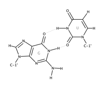 Guanina y uracilo unidas en apareamiento por balanceo